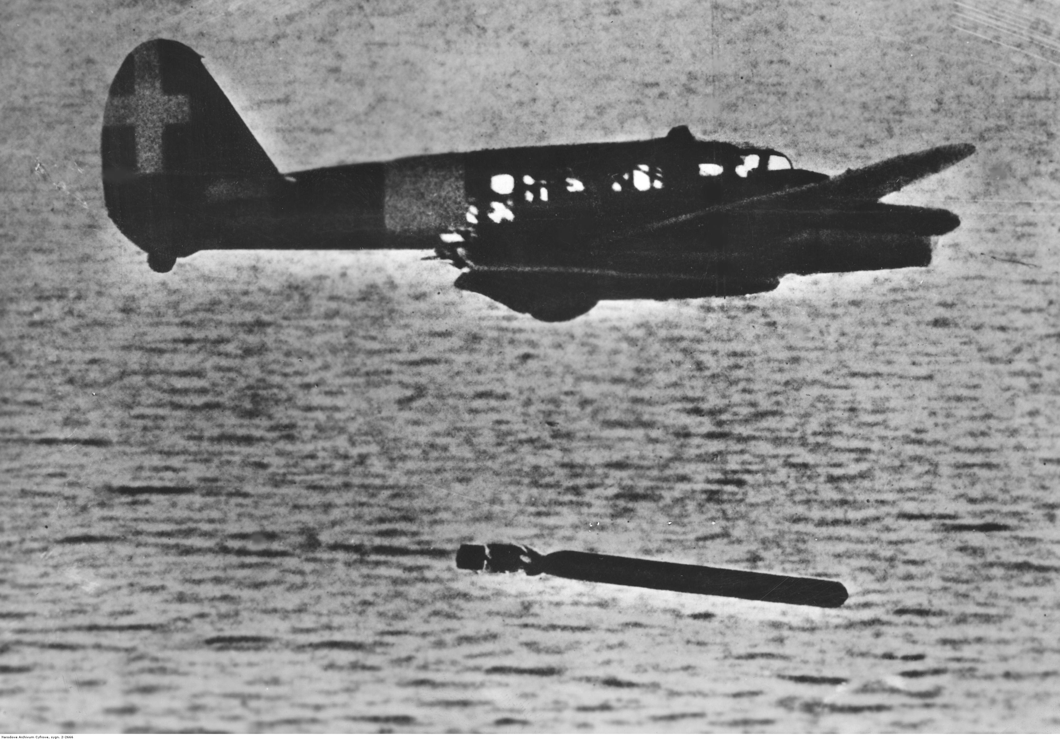 Włoski samolot rozpoznawczo-bombowy Caproni Ca.314 w locie bojowym po zrzucie torpedy.